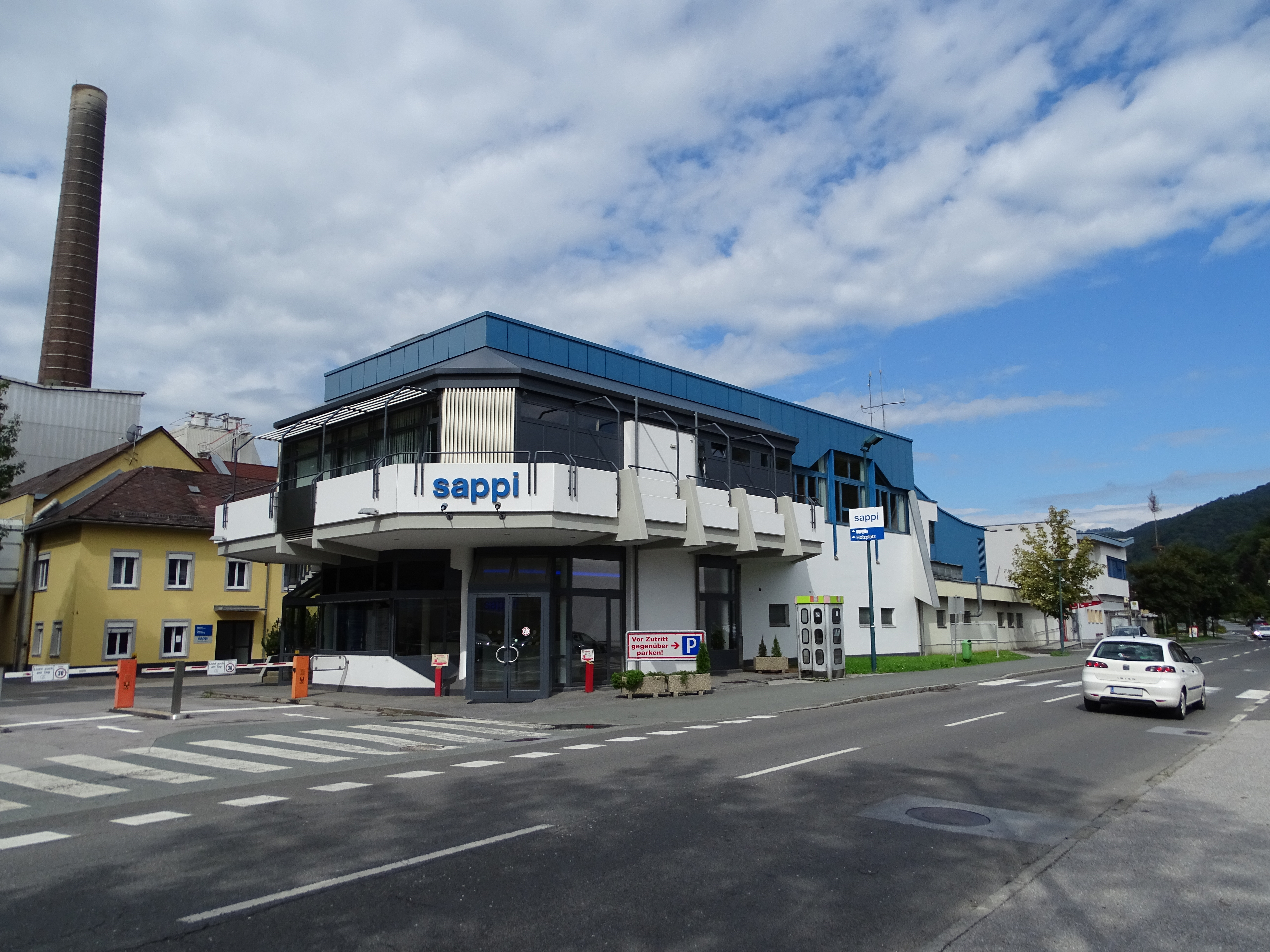 Das Empfangsgebäude für Besucher der SAPPI in Gratkorn